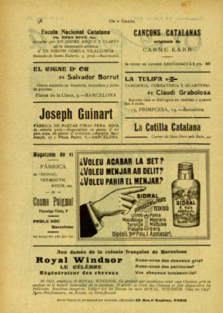 pàgina d'anuncis d'or y grana